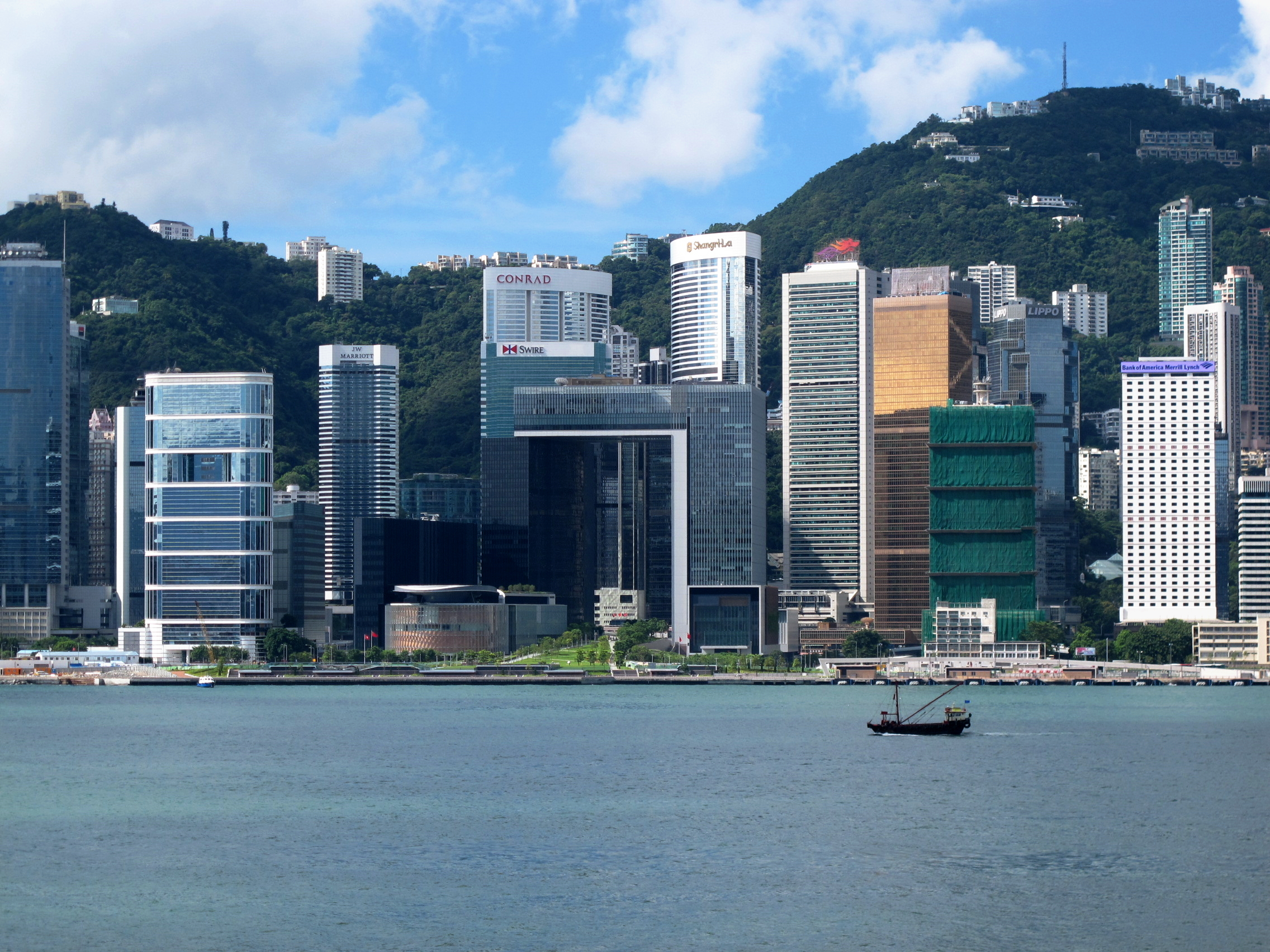 Buildings in Admirity, Hong Kong 金鐘